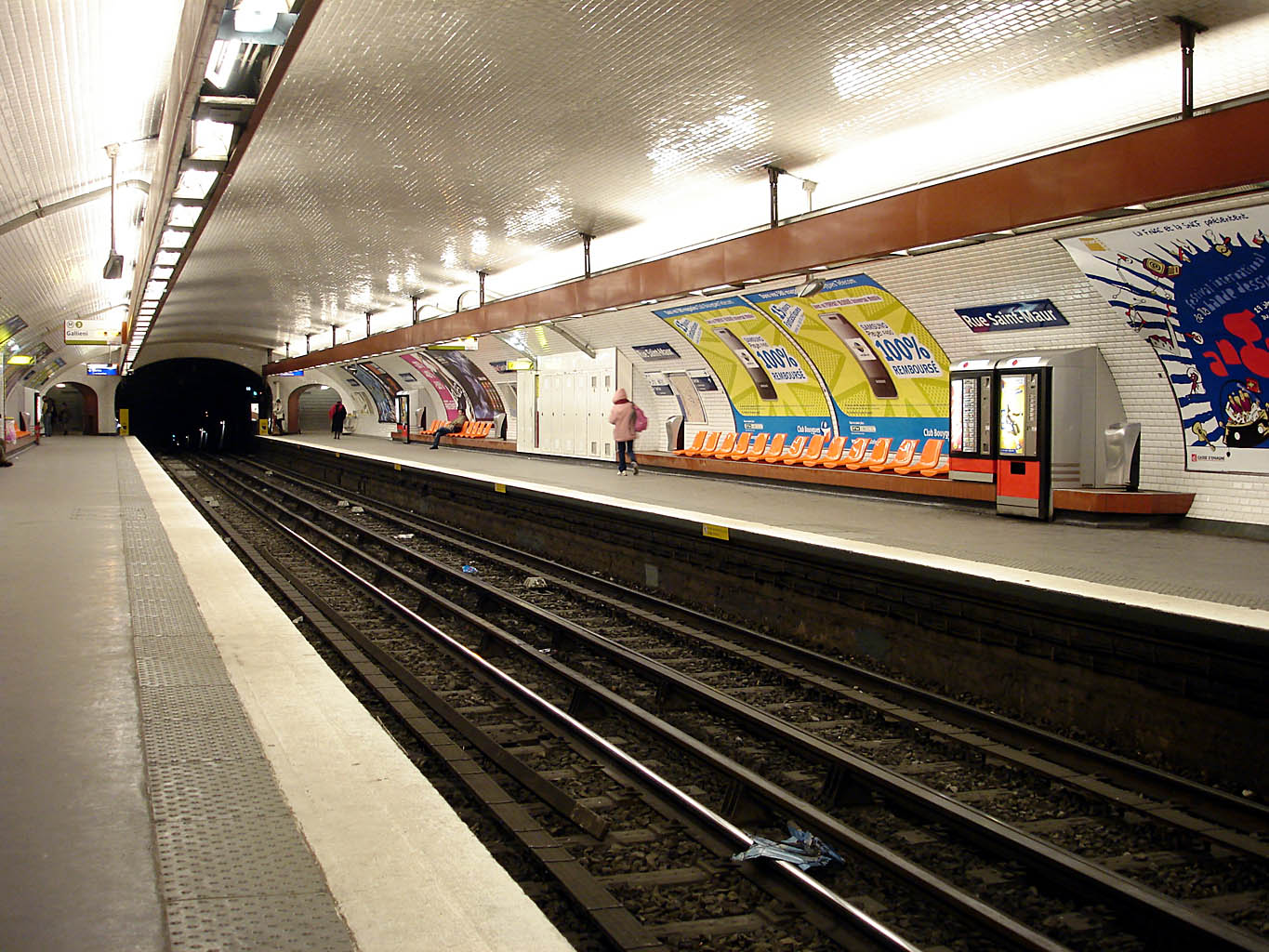 Station Rue Saint-Maur de la ligne 3 du métro de Paris, France.